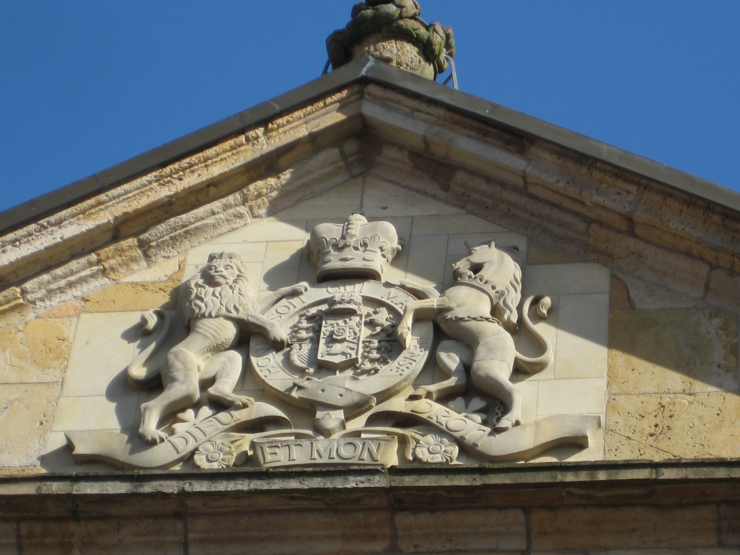 Bischöfliche Kanzlei in Osnabrück, Giebel mit Wappen am Mittelrisalit zur Seite Hasestraße, 1966 von Fritz Szalinski rekonstruiert